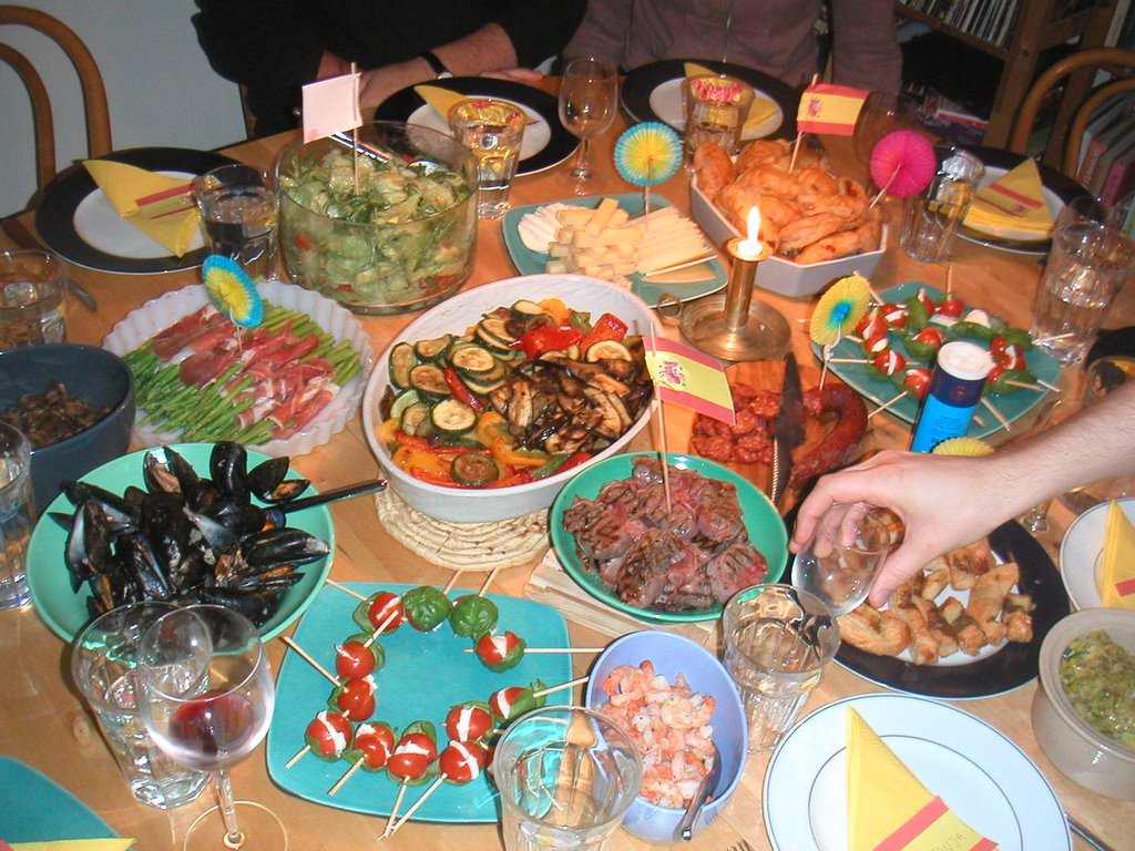 Tapas